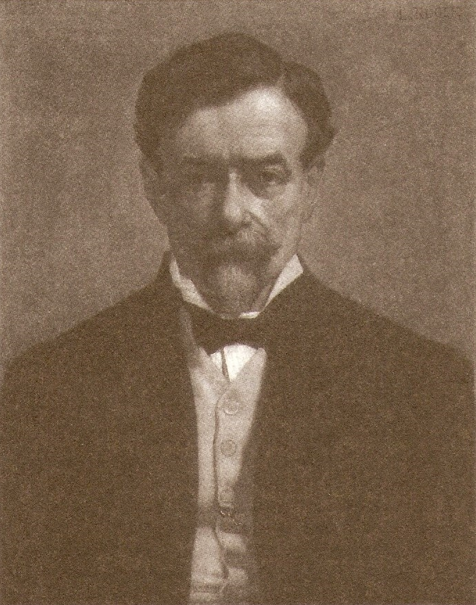 Charles Brunellière (1847-1917)